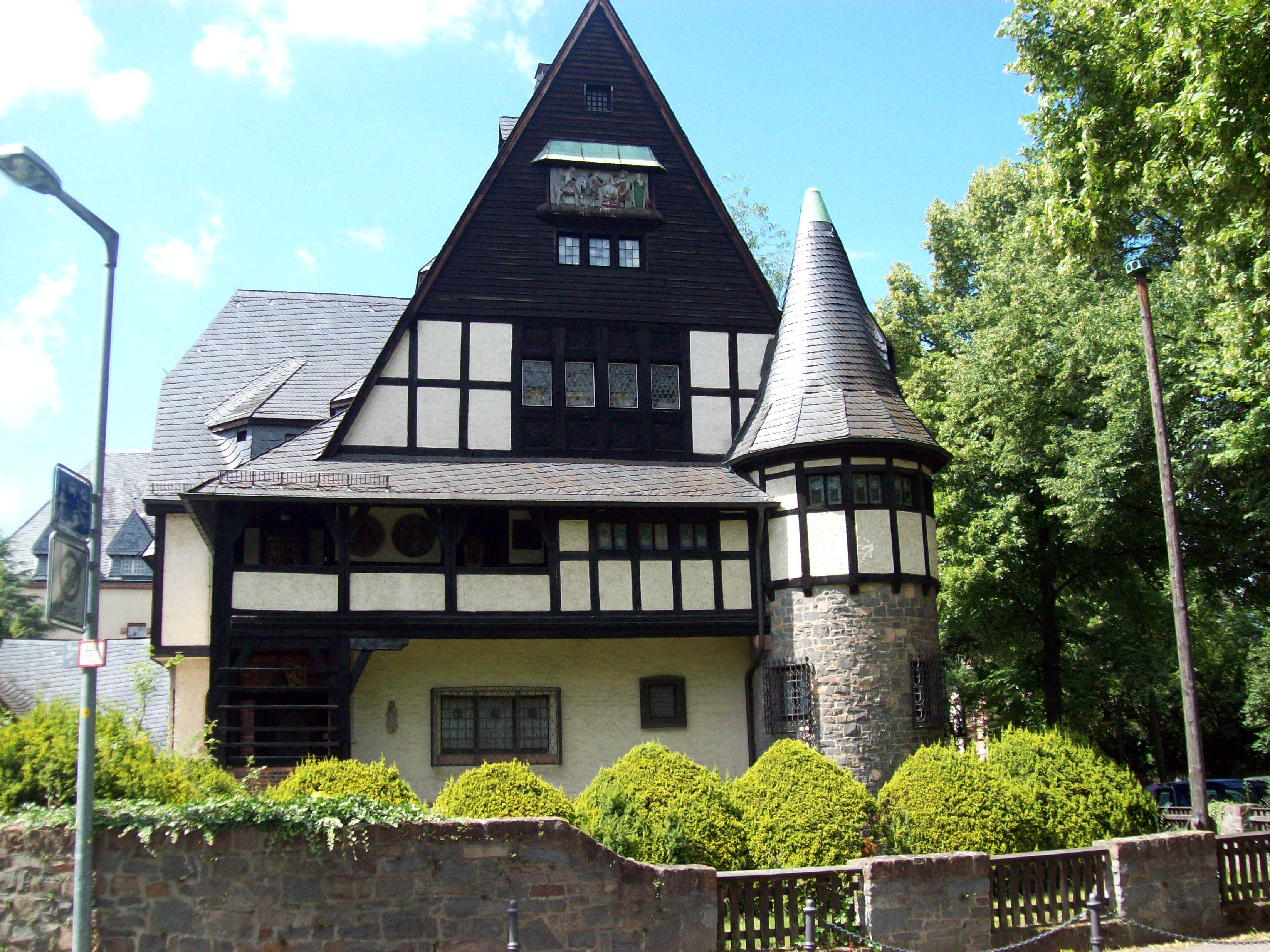 Gentilvilla, Haus für die Kunstsammlungen Anton Kilian Gentils, Aschaffenburg, in der Lindenallee, erbaut 1922/23, Ostseite: Erdgeschoss Bruchsteinmauerwerk darüber Fachwerkbau